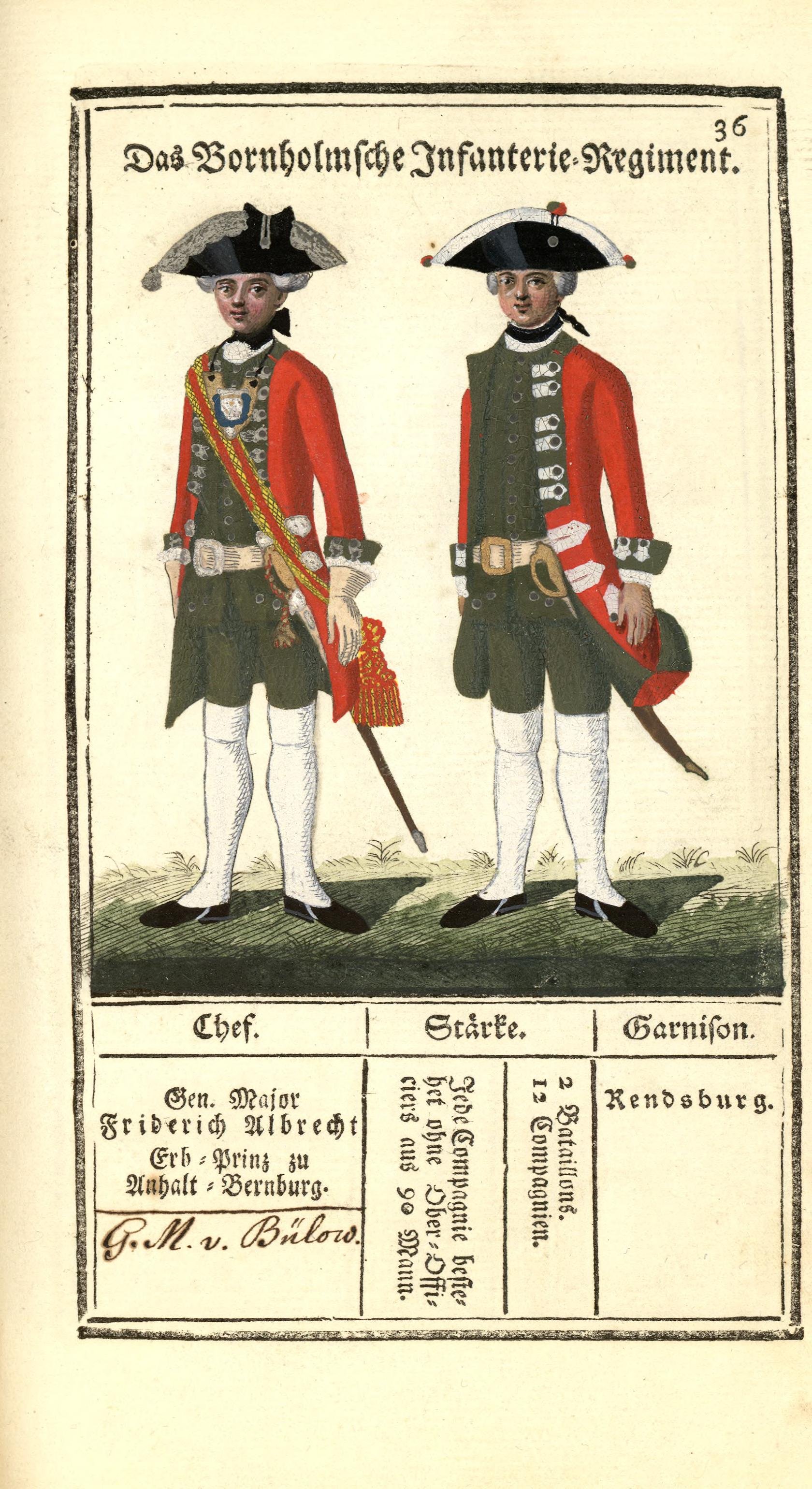 Illustrasjon hentet fra boken "Vorstellung der sämtlichen Königl. Dänischen Armee" av Bertram, Carl og utgitt av Carl Bertram (dk, 1763)